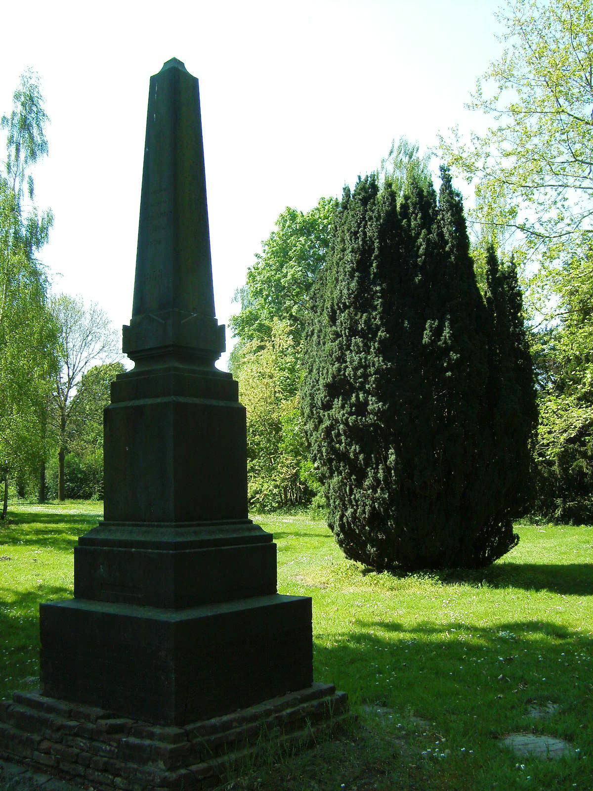 Gedenknaald (1858) op het voormalig landgoed 'Brinkgreve' te Deventer ter herinnering aan de generaals Cort Heyligers en Eksteen